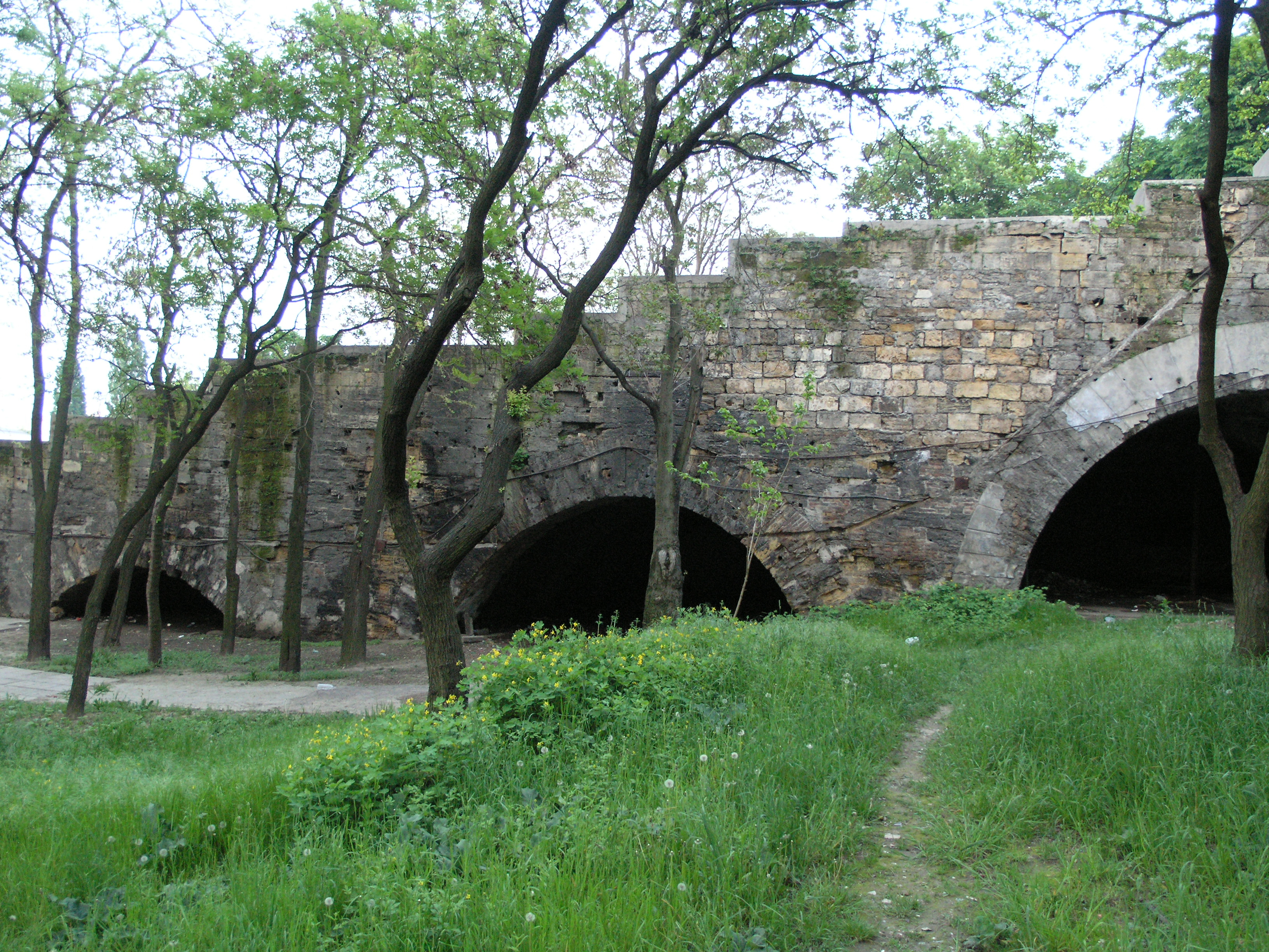 Україна, Одеса - Приморські (Гігантські, буларні, Потьомкінські) сходи